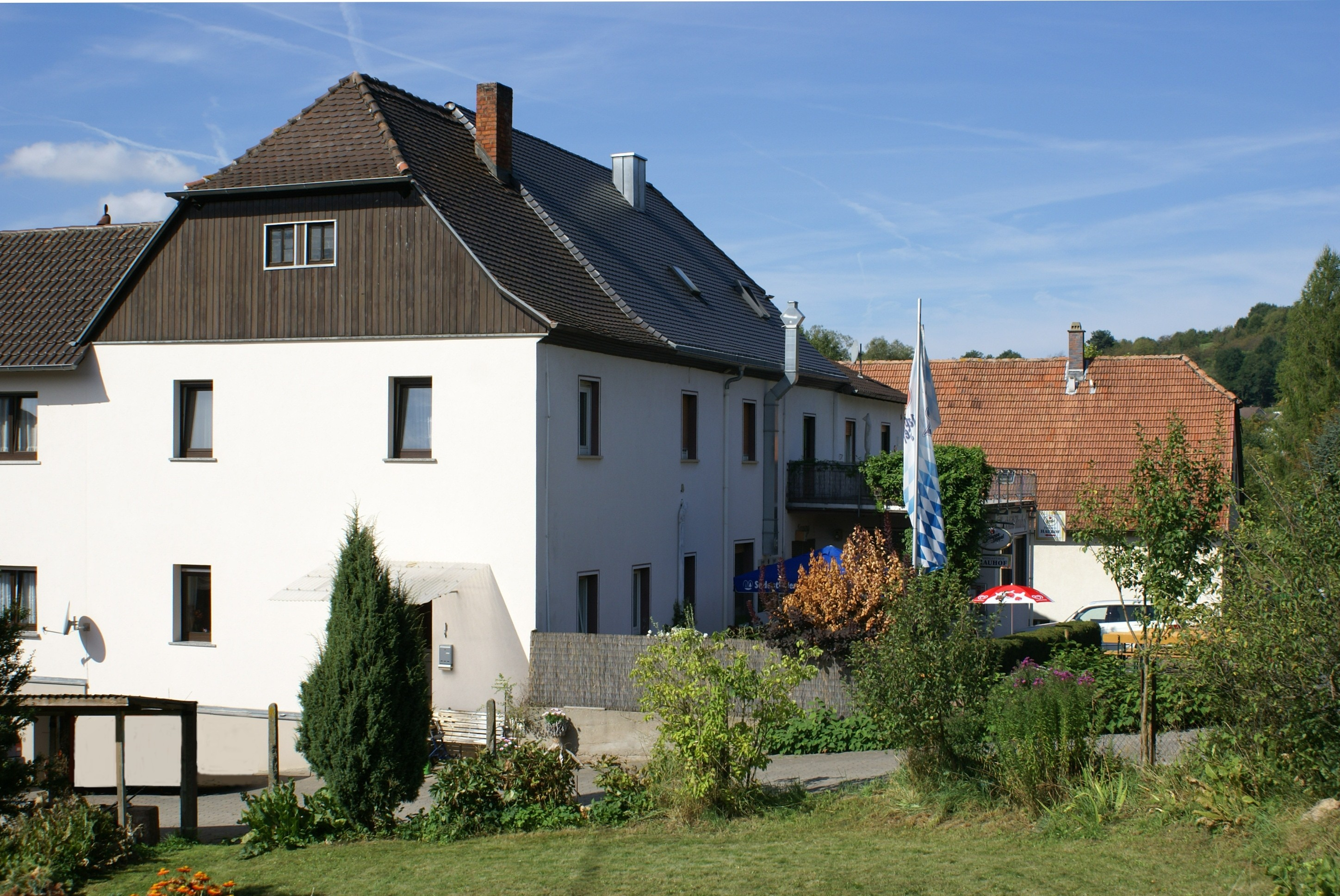 Der Landgasthof Hauhof ist auch bei Radwanderern gut bekannt, denn der Kahltal-Spessart-Radweg führt daran vorbei